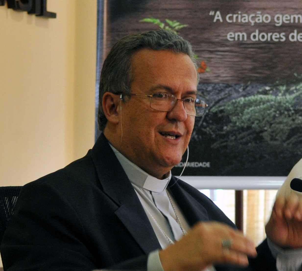 O secretário-geral da Confederação Nacional dos Bispos (CNBB), dom Dimas Lara Barbosa participa da abertura da Campanha da Fraternidade 2011